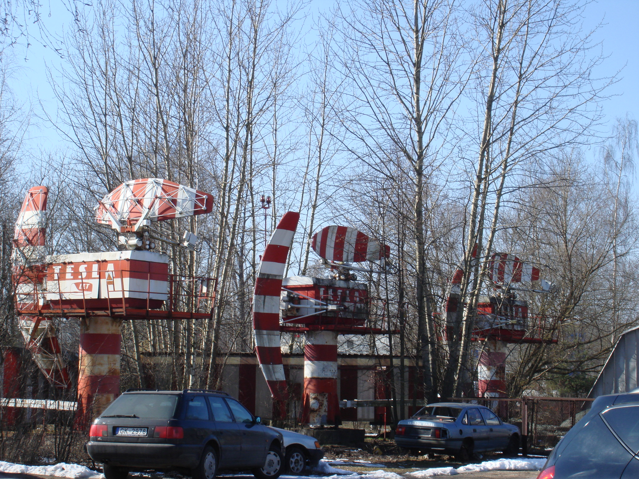 Бывший радиополигон РКИИГА